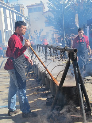 Remenant les calderes amb llargues culleres